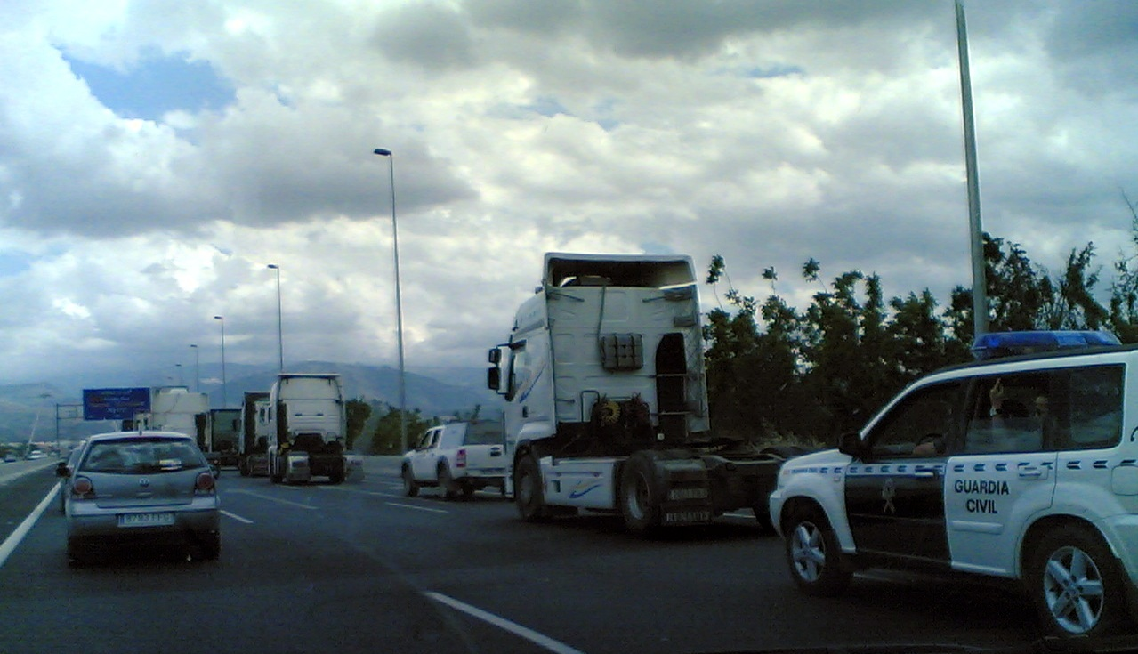 Circunvalación de Granada (España)